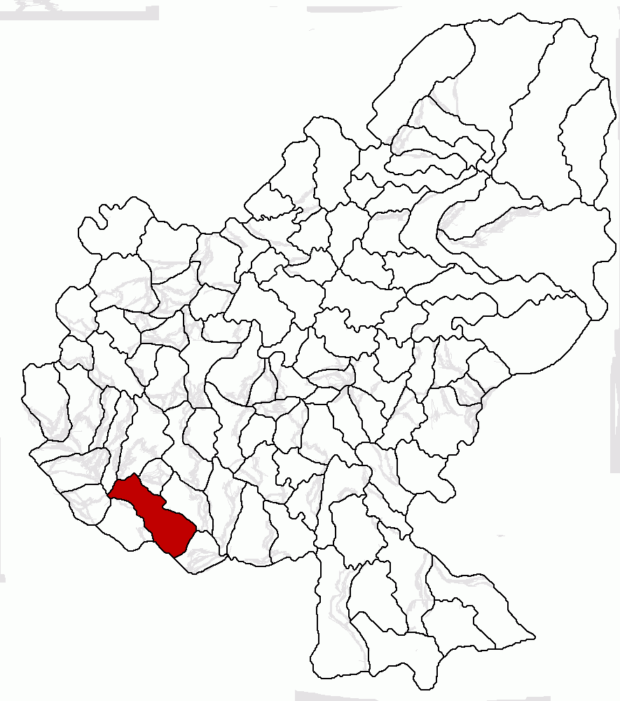 Categorie:Hărţi ale judeţului Mureş